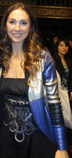 Julieta Pink en la entrega de los PREMIOS ETER 2011 (Teatro Cervantes)